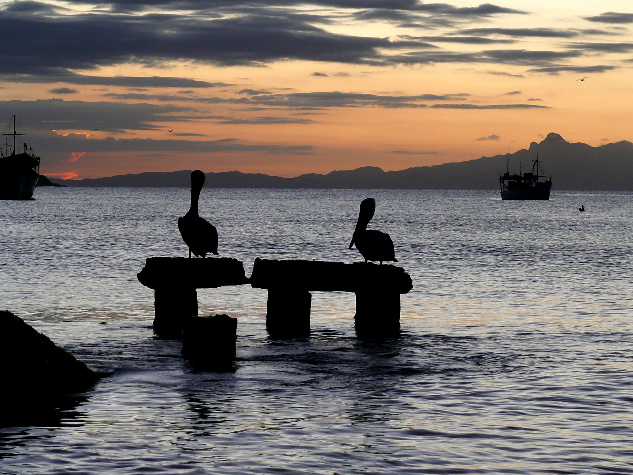 Bahia de Juan Griego - Nva. Esparta